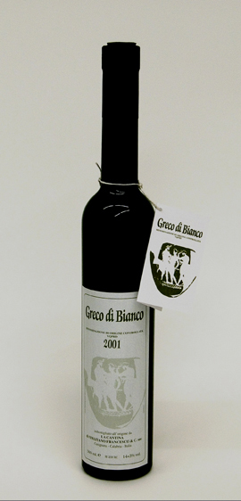 vino passito Greco di Bianco a Denominazione di Origine Controllata